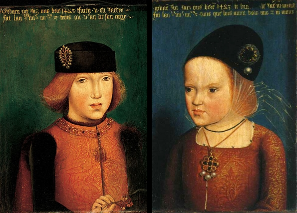 Philippe le beau 5 ans, Rapprochement de deux tableaux séparés (Philadelphia museun et Versailles)